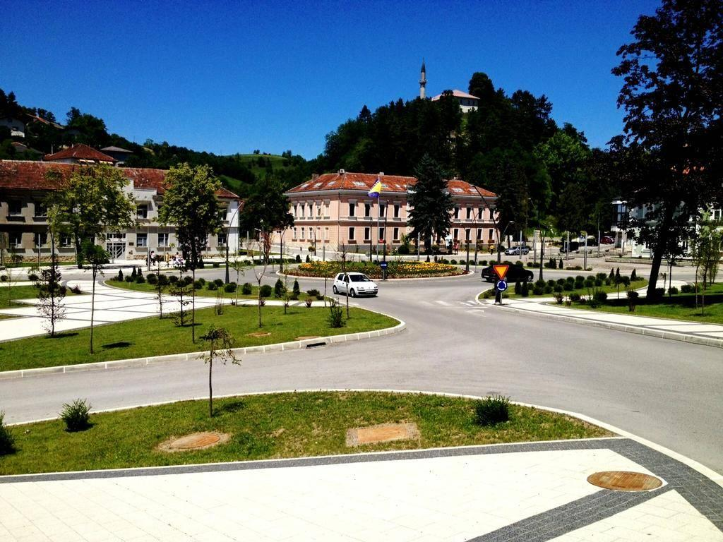 Cazin